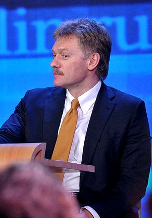 Пресс-секретарь президента Российской Федерации Дмитрий Сергеевич Песков